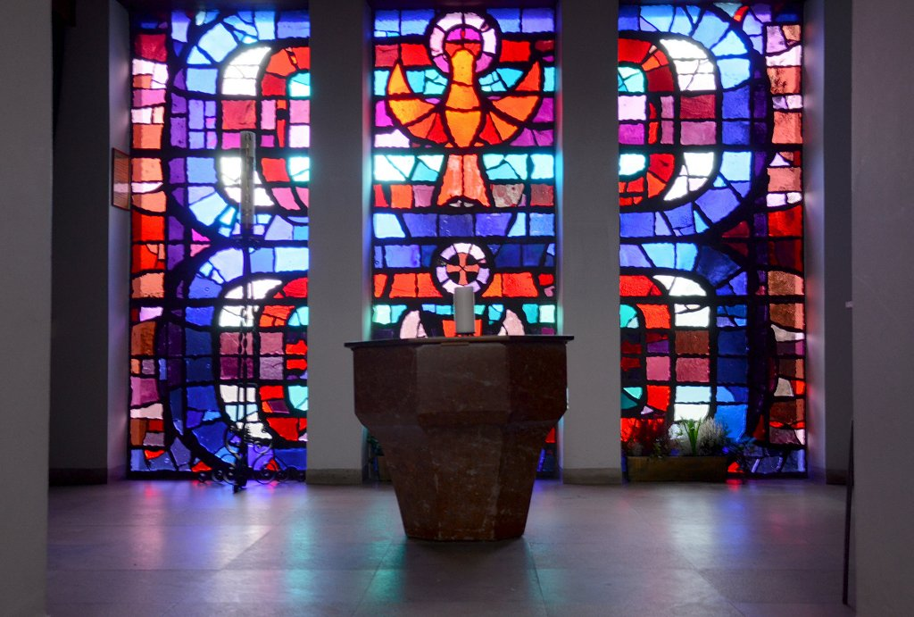 Taufbecken in der röm.-kath. Pfarrkirche Ansfelden